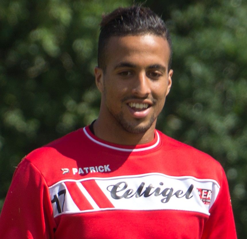 Rachid Alioui à l'entrainement le 10 juillet 2014